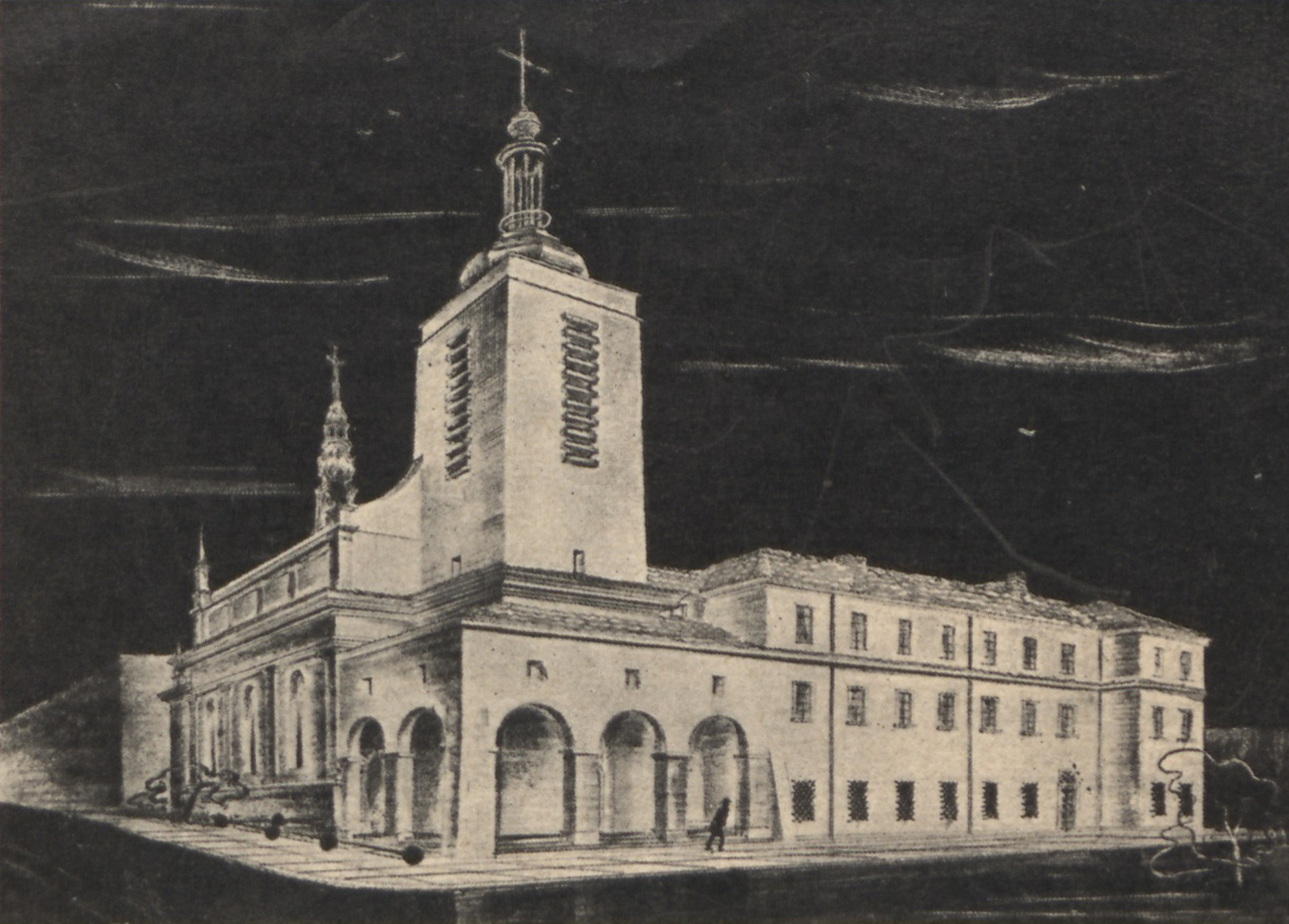 Проект перебудови костелу монастиря кларисок у Львові. Архітектор Антоній Лобос (1903—1945).